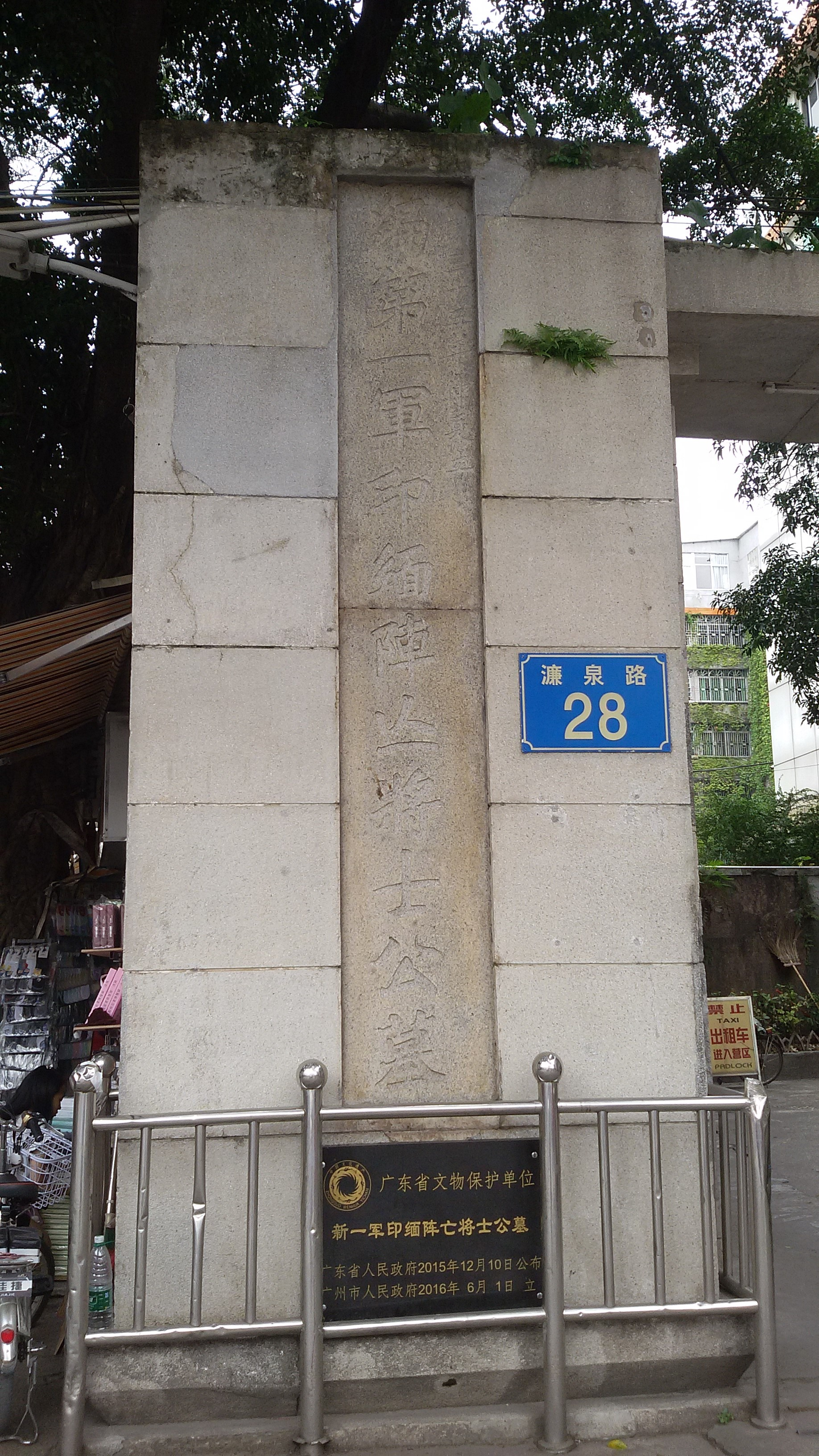 粵語: 新一軍印緬陣亡將士公墓東門樓隔籬條柱